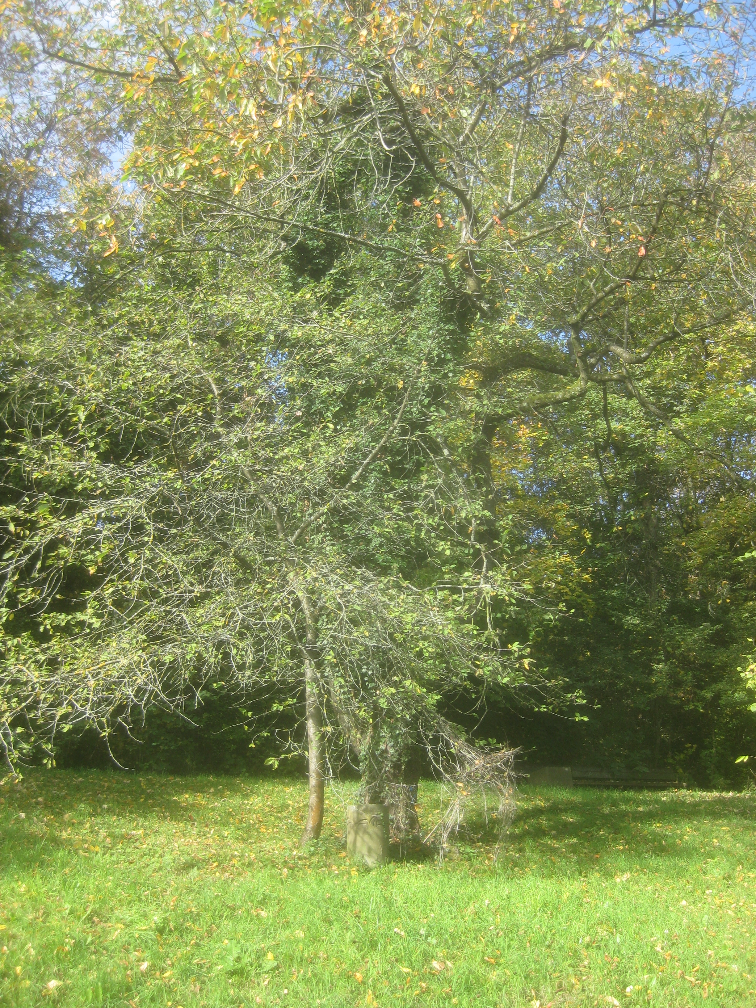 Raststelle und Lyrikstation mit einem Gedicht („i mog di“) eines unbekannten Dichters östlich der Kunststation Im Keuper von Hans Dieter Bohnet auf dem Wartberggelände in Stuttgart.